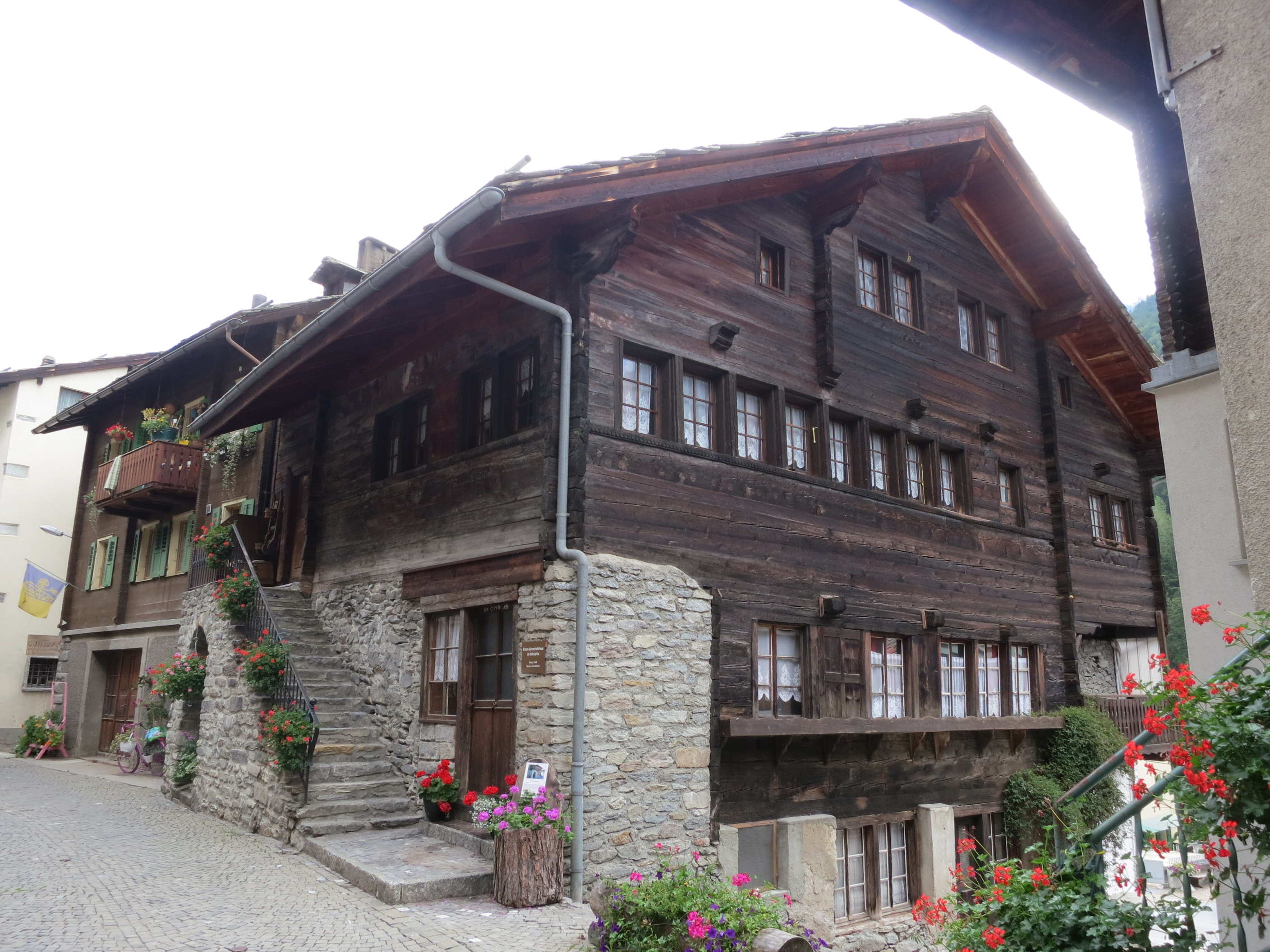 ehemaliges Gemeindehaus aus dem Jahr 1640, St. Niklaus VS, Schweiz